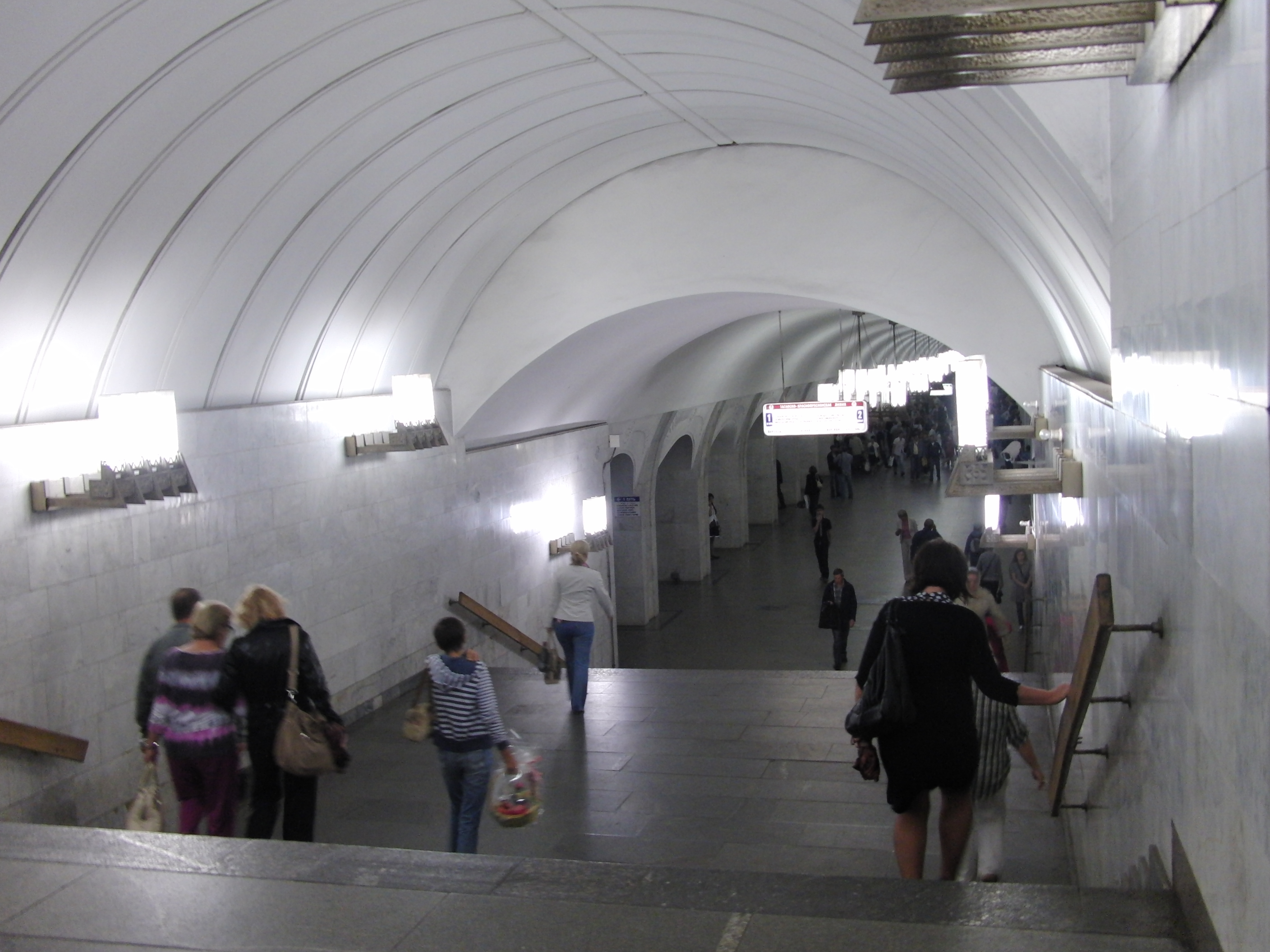 Pushkinskaya (Пушкинская)